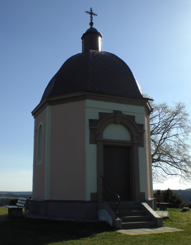 Kapelle Alter Berg auf dem Alten Berg oberhalb Böttingen, Baden-Württemberg